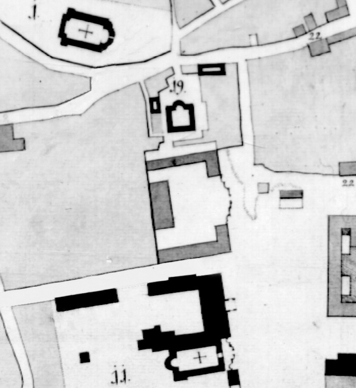 Мінск. План 1793 г. (РДВГА)Беларуская (тарашкевіца): Менск (Miensk). Плян места